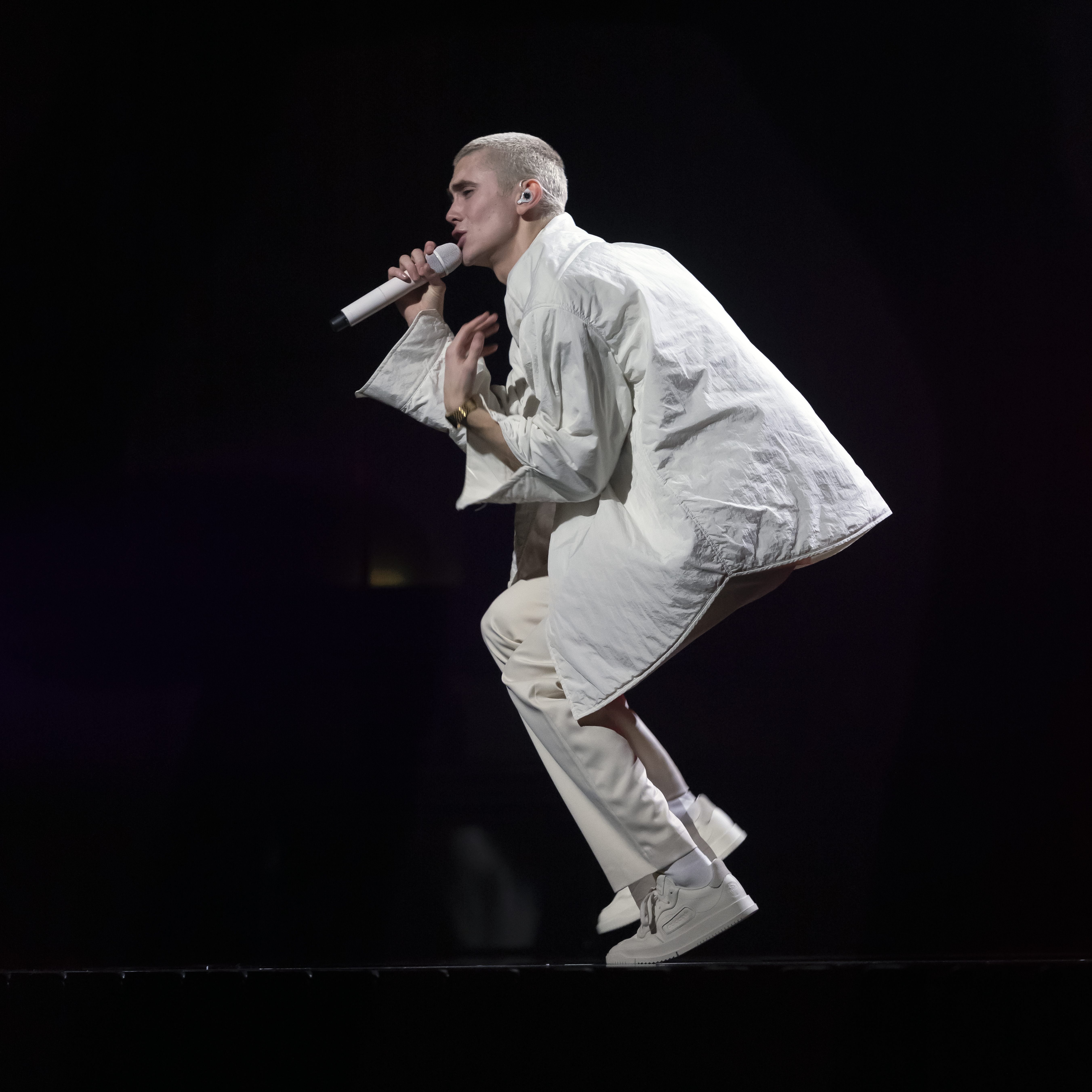 Felix Sandman Melodifestivalen 2020 Linköping genrep